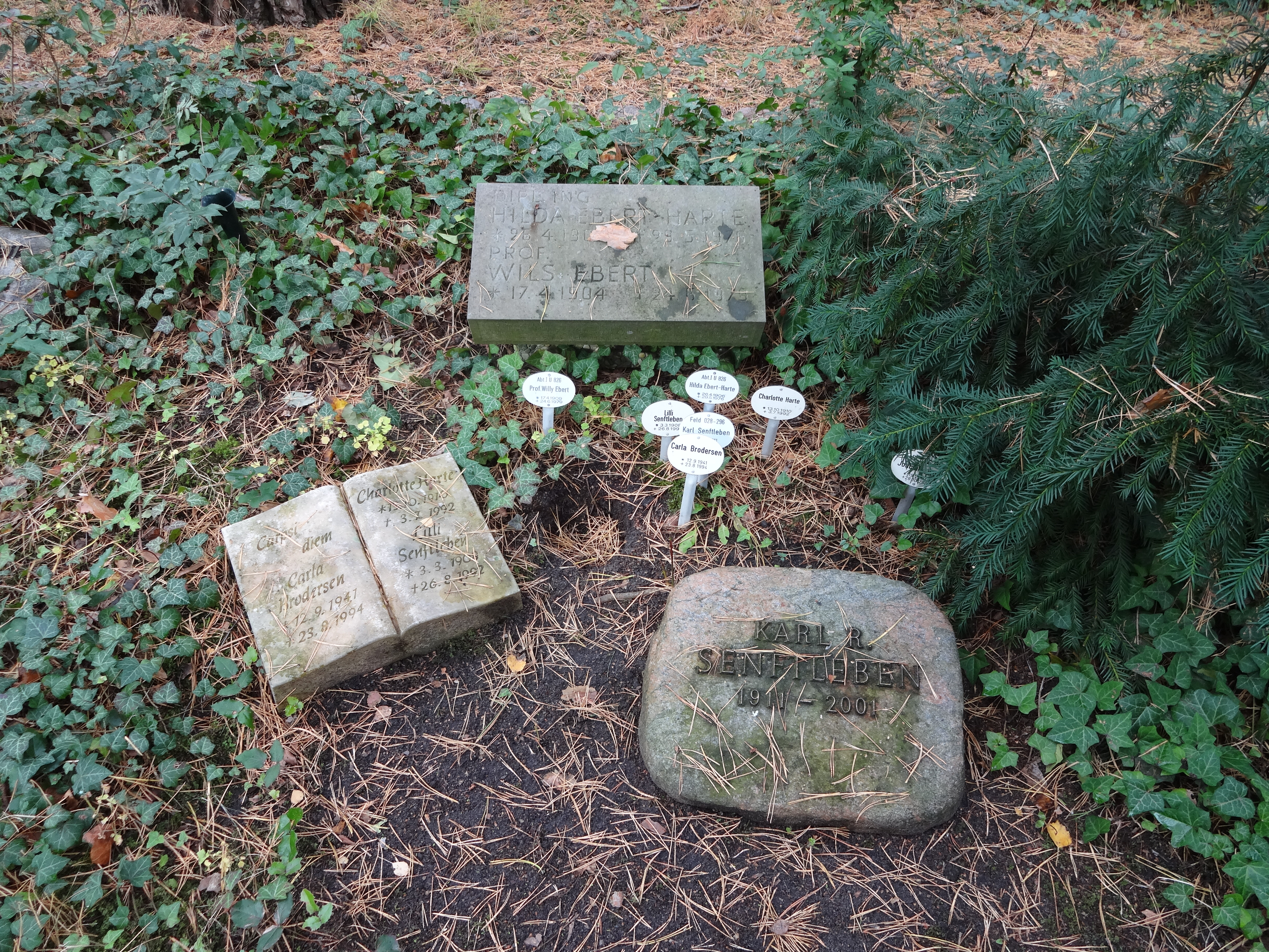 Grab von Prof. Wils Ebert auf dem Waldfriedhof Zehlendorf